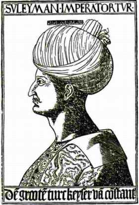 SuleimanII